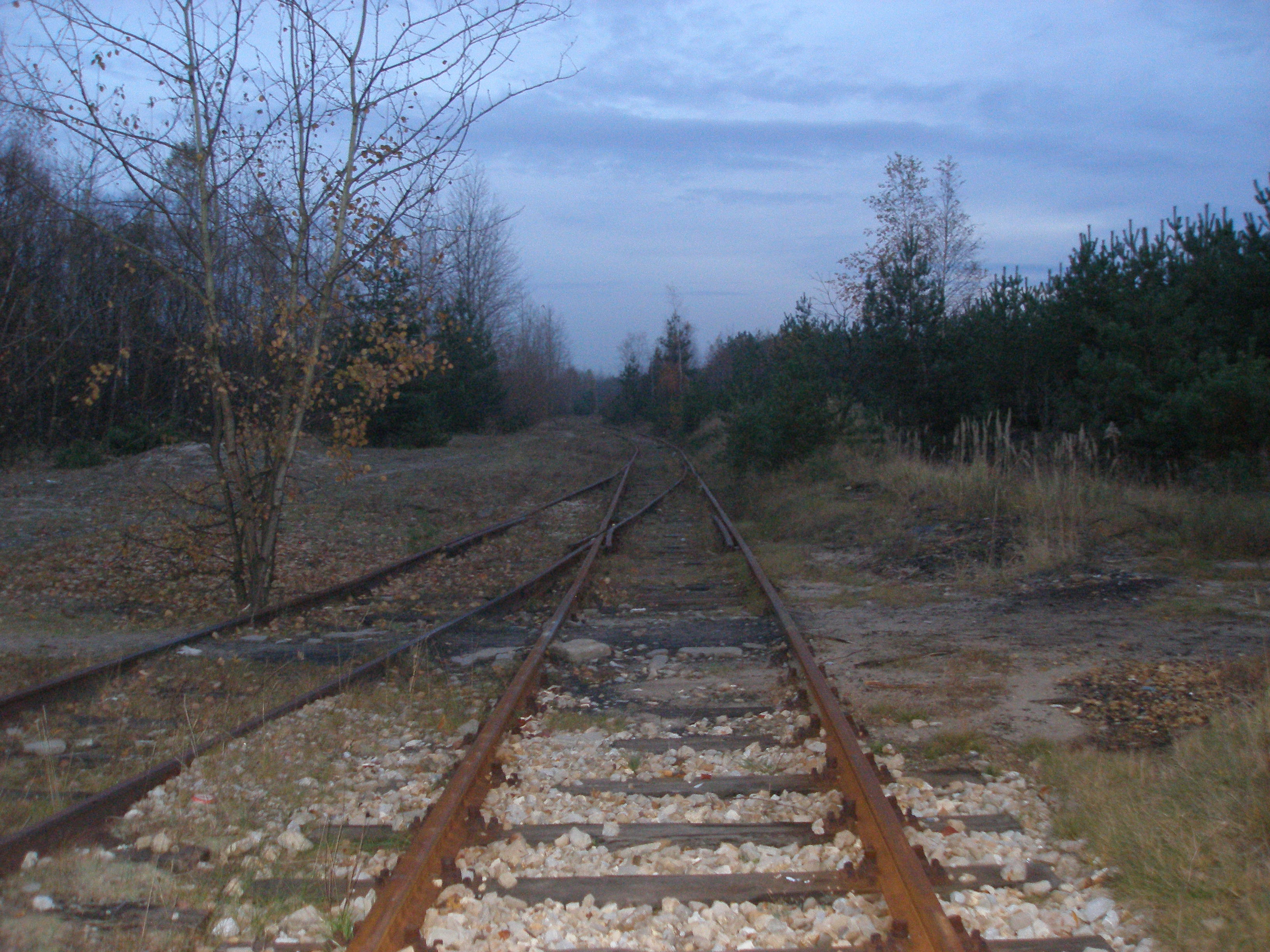 Tory w Bukownie